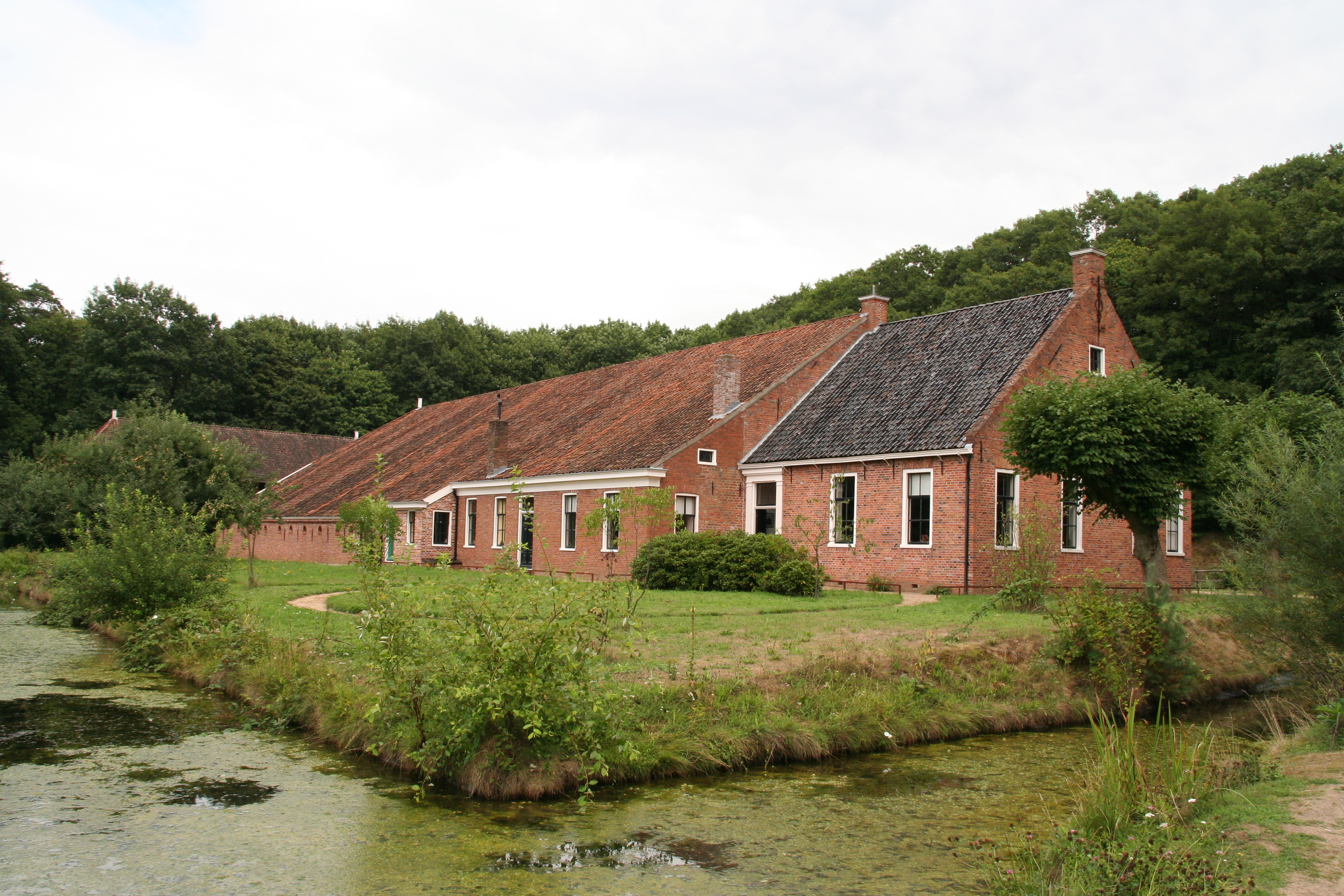 Oude herenboerderij uit het Groningense Beerta, te zien in het Nederlands Openluchtmuseum te Arnhem.